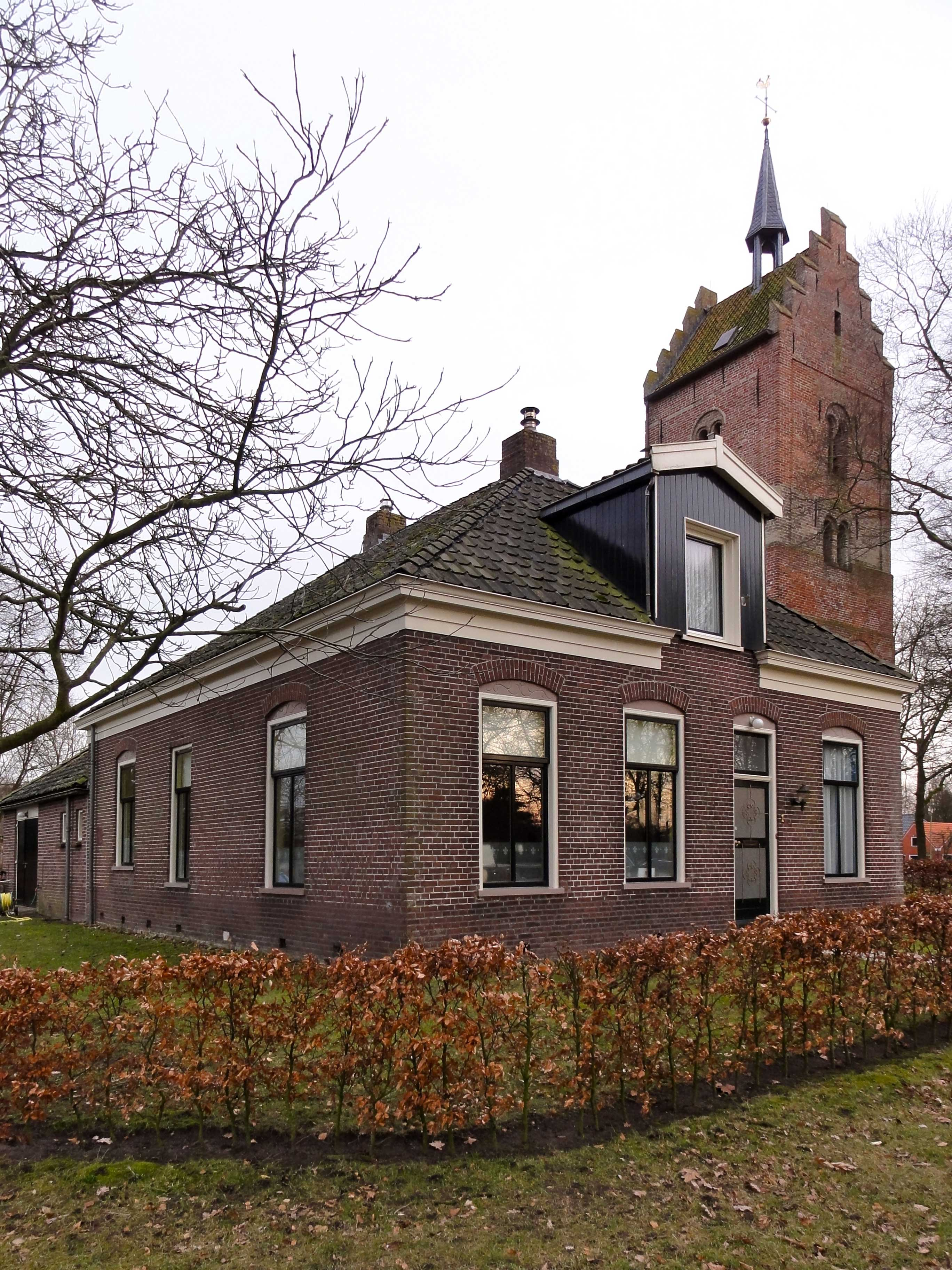 Kosterswoning aan de Kerbrink 1 in Anloo, provinciaal monument